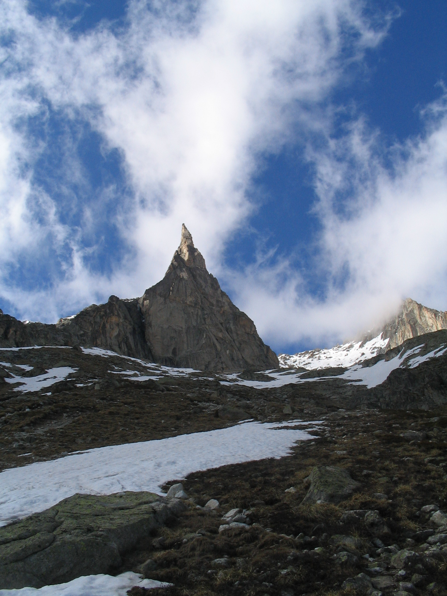 Aiguille de la Dibona fin mai 2006